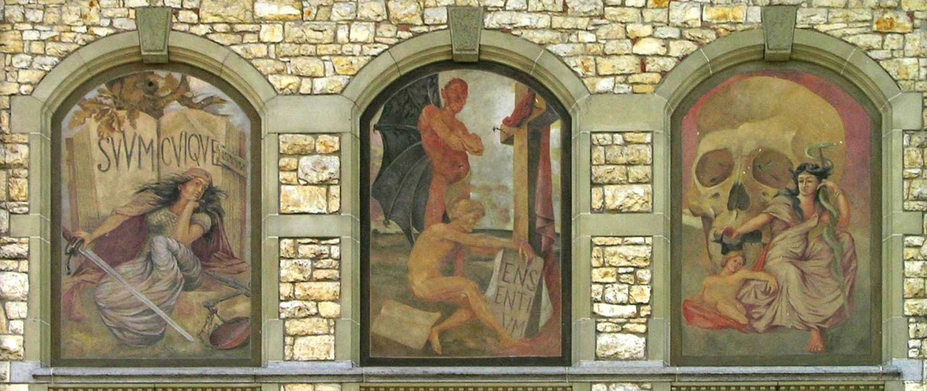 Zweiter Stock der Ost-Fassade des Albert-Einstein-Hauses der Alten Kantonsschule Aarau